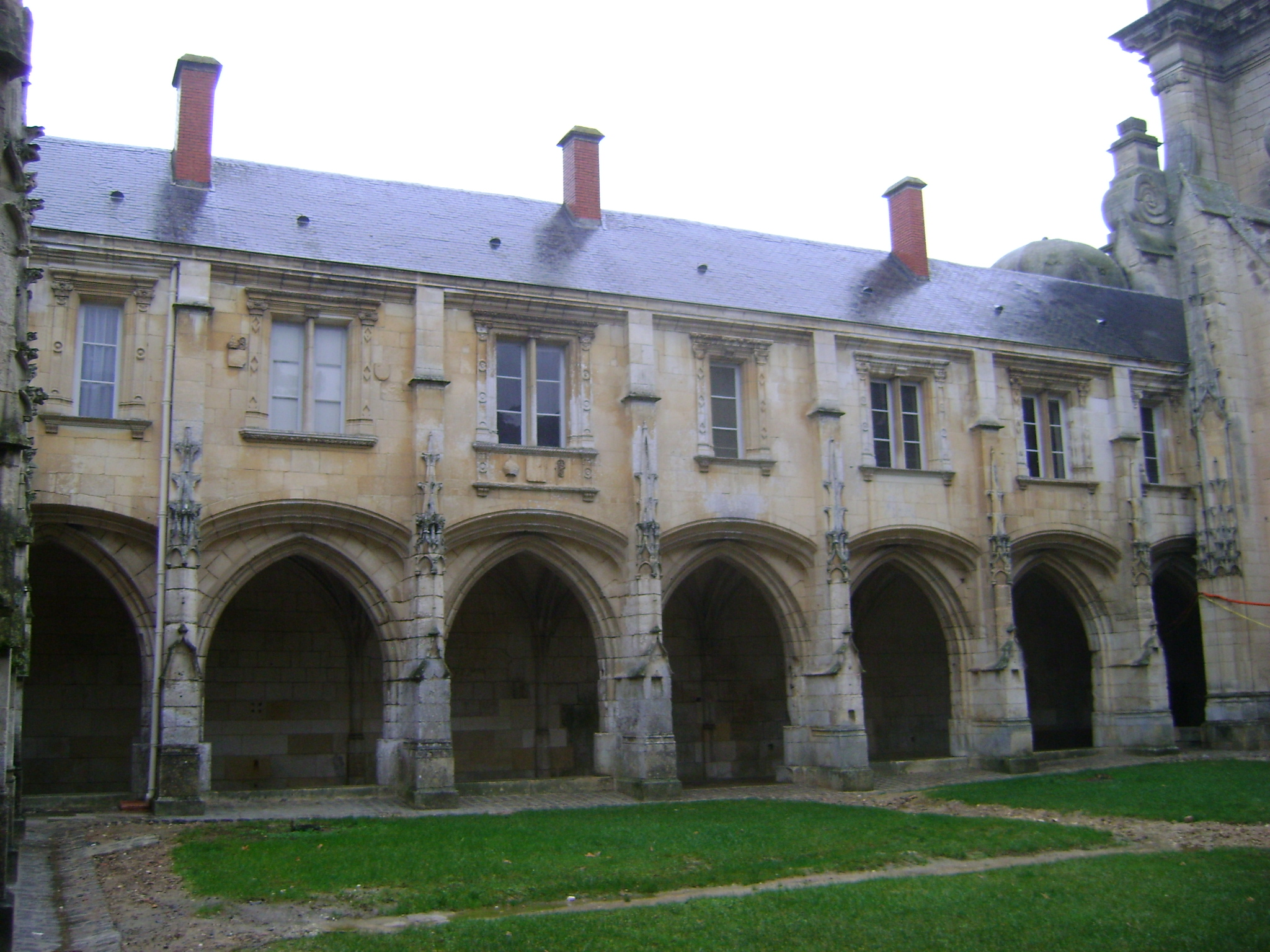 Cathédrale Notre-Dame-de-l'Assomption de Luçon, Vendée. Galerie ouest du cloître. .